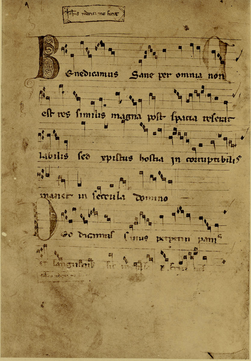 Folio 160 verso, du Codex Las Huelgas